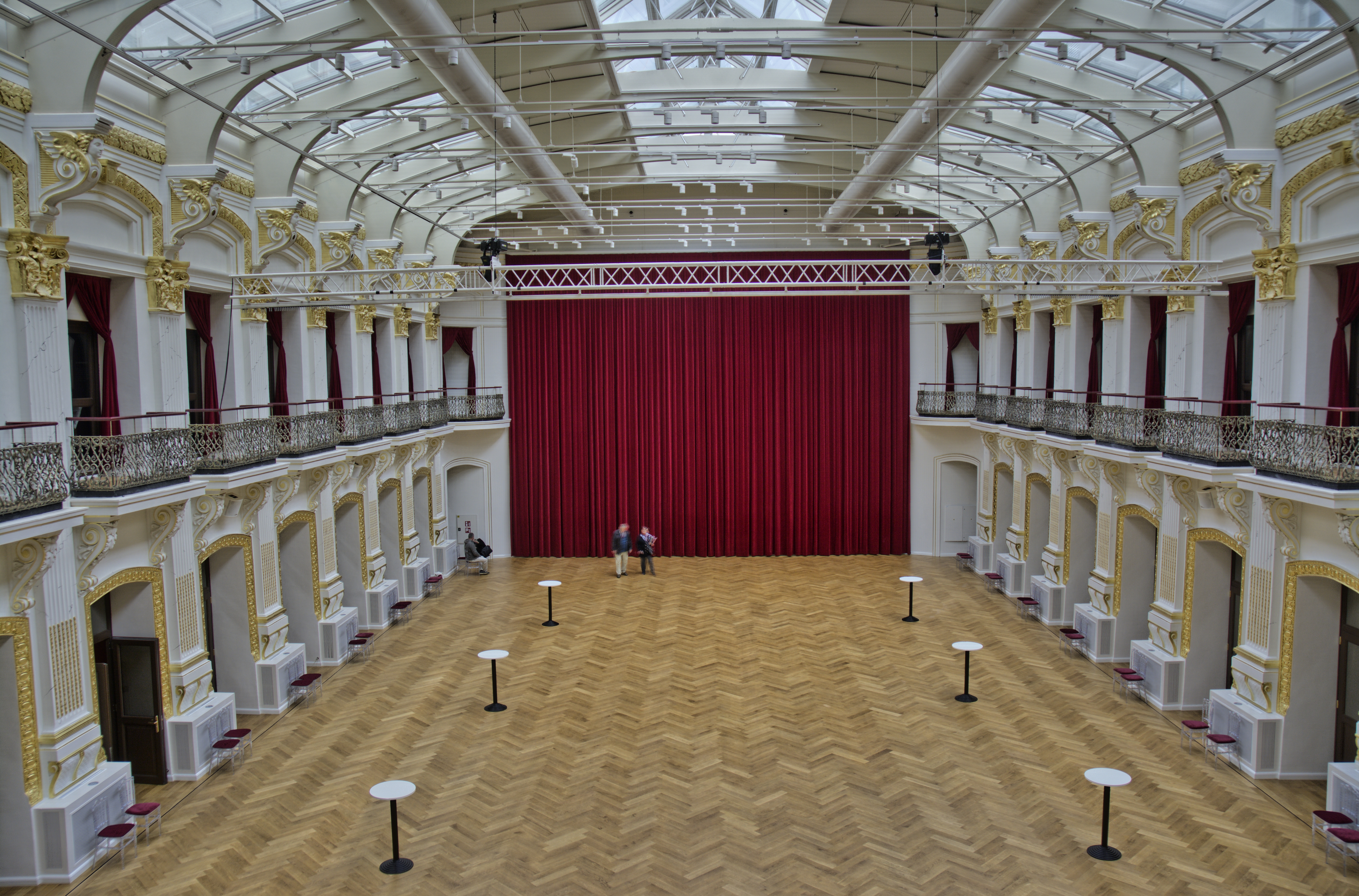 Sofiensäle Dieses Bild wurde anlässlich des österreichischen Tags des Denkmals 2015 in Wien eingereicht.